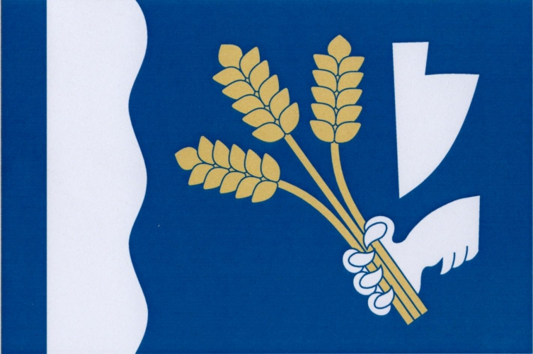 vlajka, Žichlínek, okres Ústí nad Orlicí